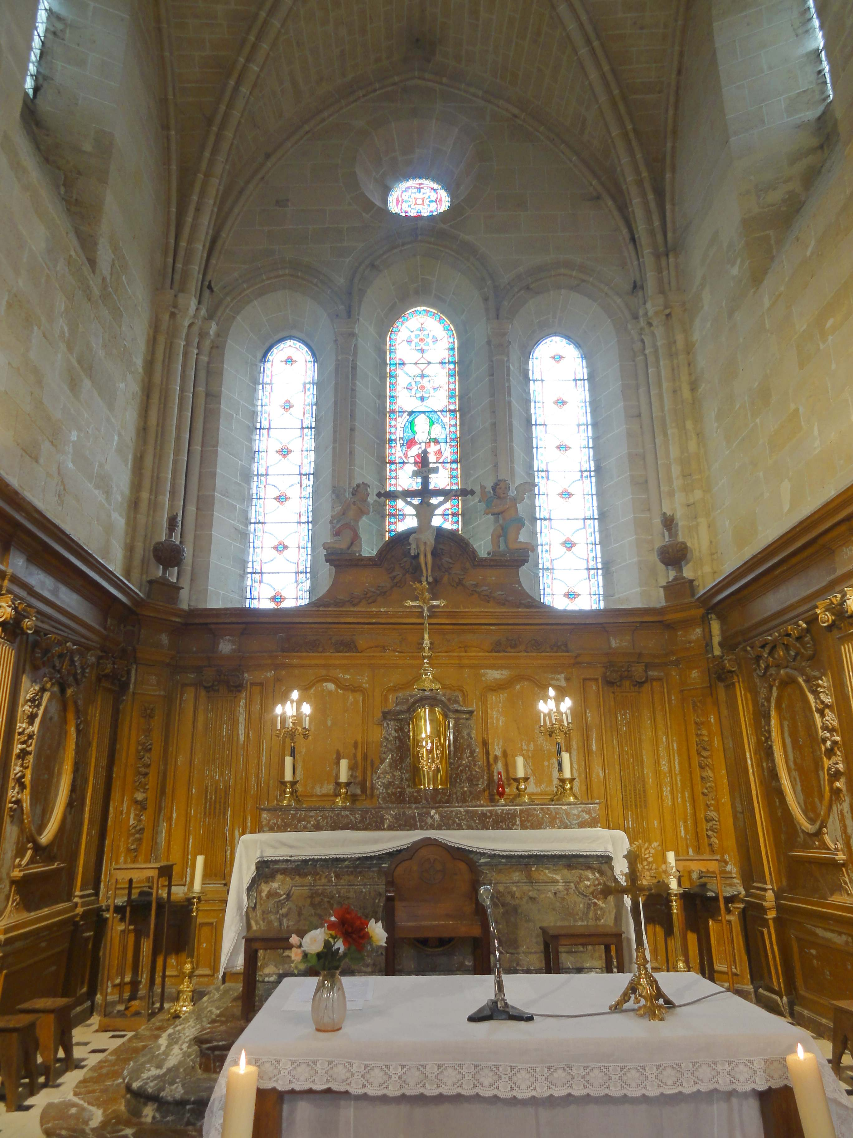 Intérieur de l'église - voir titre.